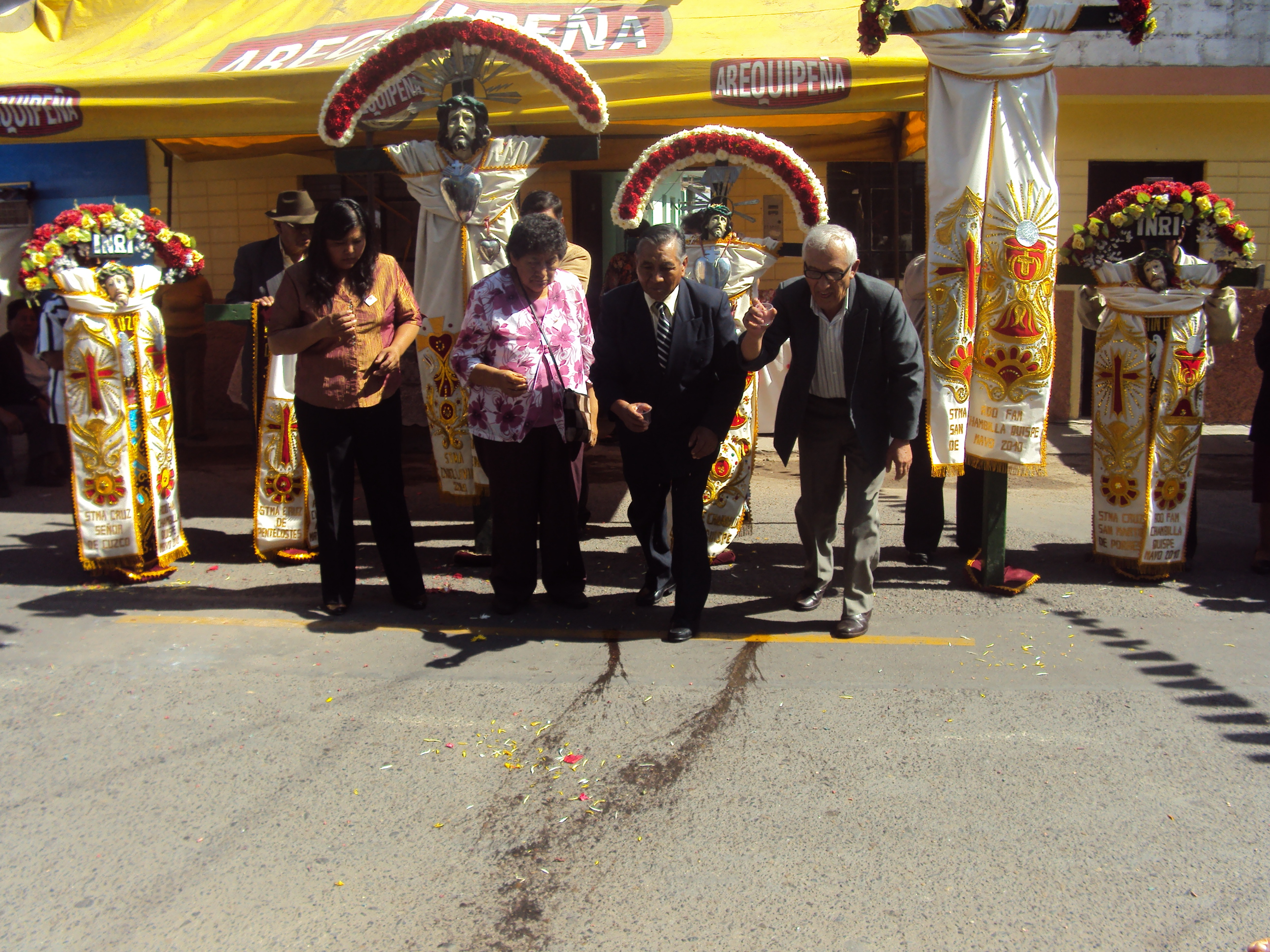 "challa" fiesta de cruces en tacna